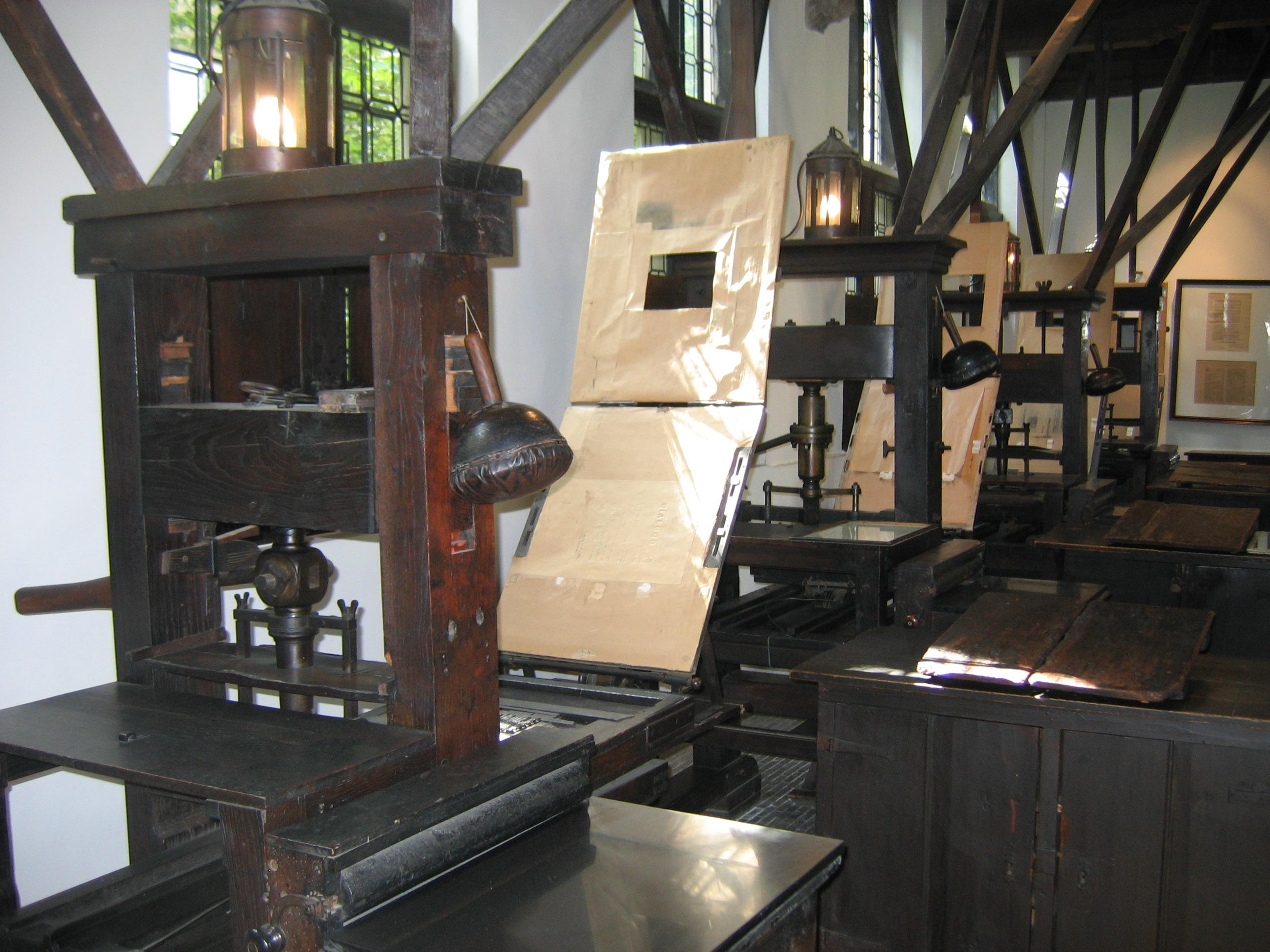 Trykksalen i Plantin Moretus museum.